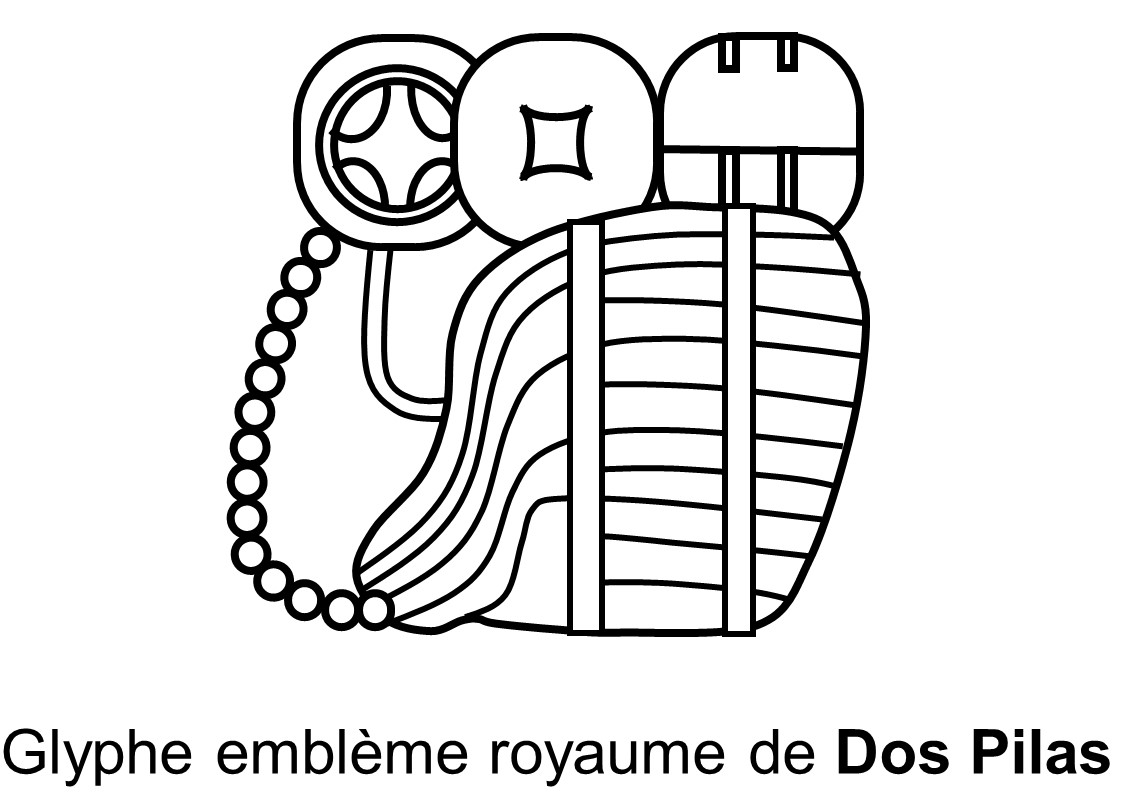 Glyphe emblème de la cité antique de Dos Pilass